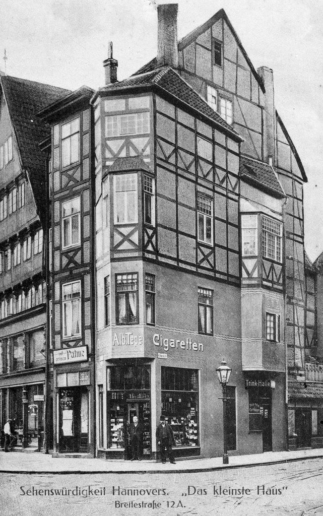 Foto um 1910 eines historischen, schmalen Eckgebäudes in Hannover, angepriesen als „Sehenswürdigkeit Hannovers. Das kleinste Haus. Breite Straße 12A“ Ecke Ebhardtstraße. Das wohl zumindest in den Obergeschossen in Fachwerk-Bauweise errichtete Gebäude neben dem Gasthaus Zur grünen Palme" bot in dem Eckladen von "Alb. Tepe" Cigaretten an. Links daneben fand sich zum Zeitpunkt der Aufnahme eine „Trink-Halle“ ...